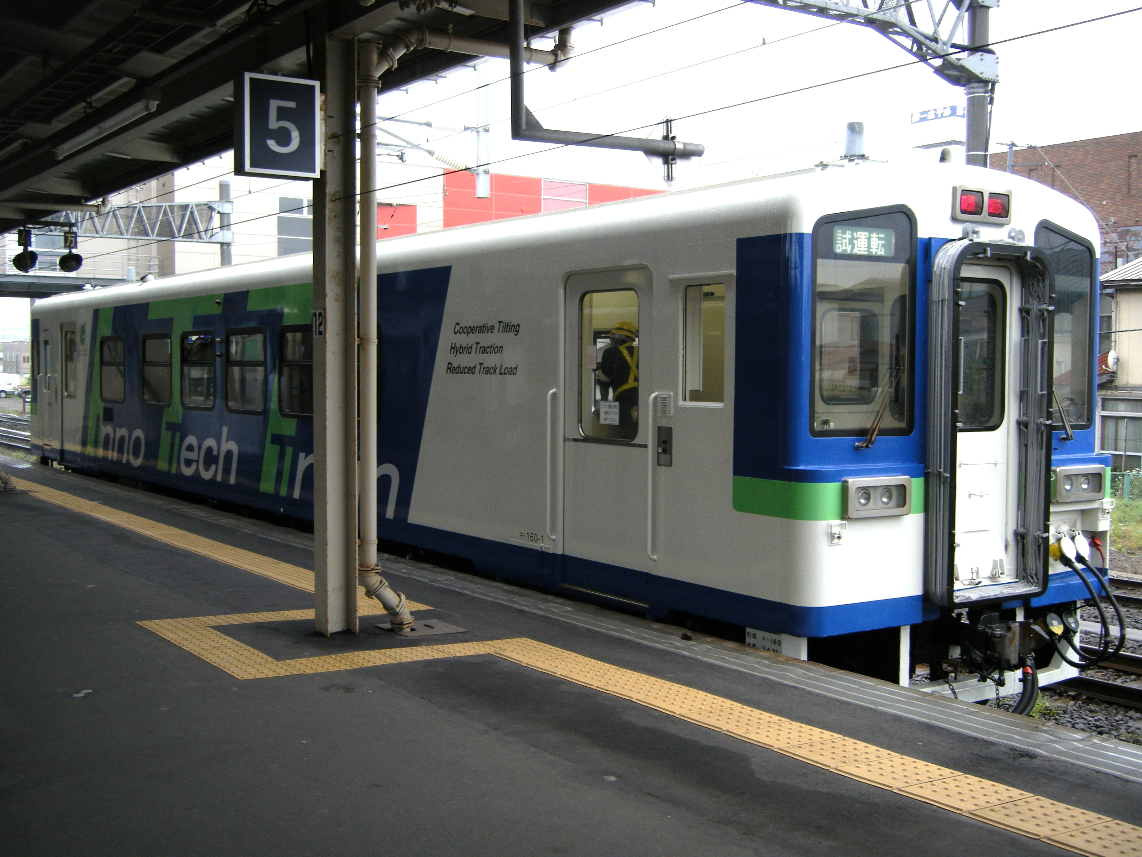 試運転中のInnovative Technology Train（ITT）を東室蘭駅にて撮影。